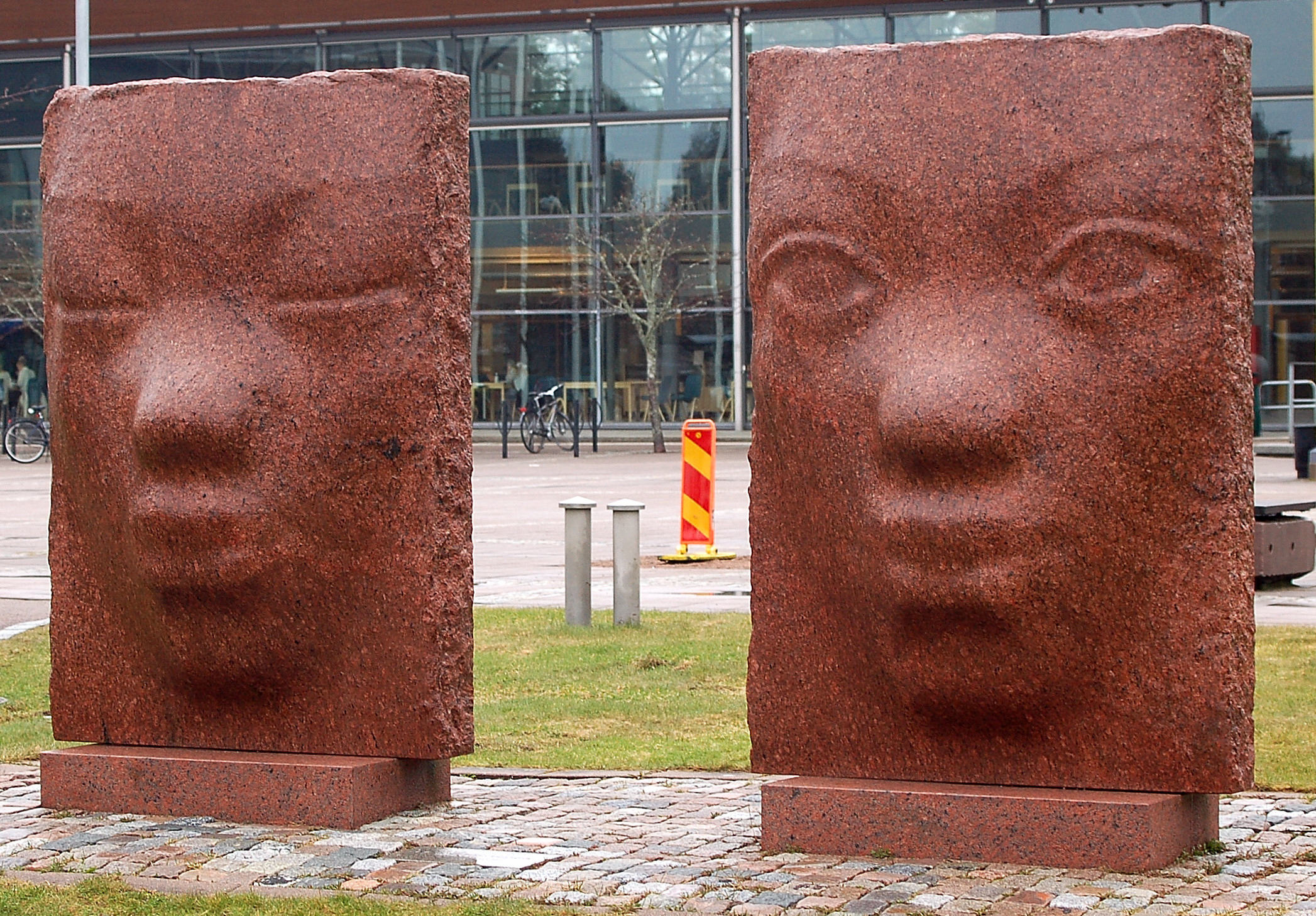 Ansikte I och Ansikte II av Kjersti Wexelsen Gokøyr placerad utanför Karlstad universitet